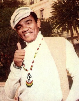 photo from Panini Cantanti '72 (1972)